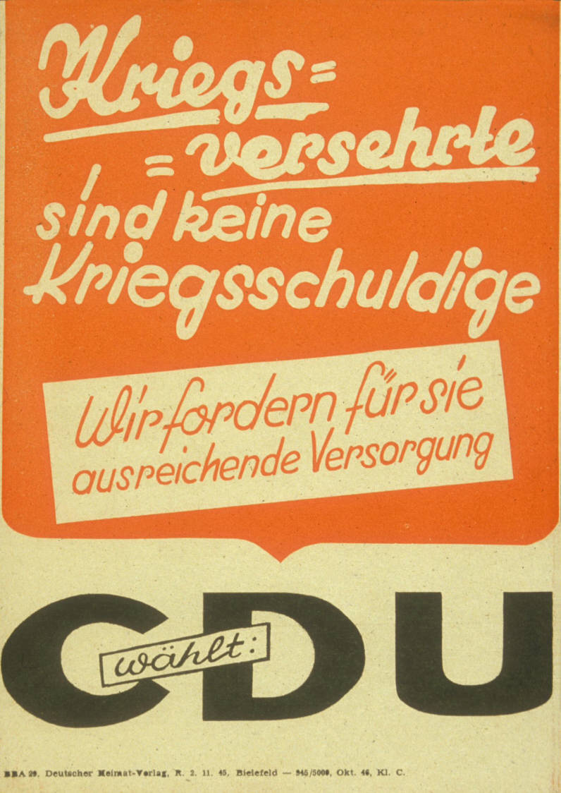 Kriegs= = versehrte sind keine Kriegsschuldige Wir fordern für sie ausreichende Versorgung Wählt: CDU Plakatart: Textplakat Allgemein Drucker_Druckart_Druckort: BBA 29. Deutscher Heimat-Verlag, R. 2.11.45, Bielefeld - 945/5000, Okt. 46, Kl. C. Objekt-Signatur: 10-017 : 147 Bestand: Kommunalwahlplakate Nordrhein-Westfalen (10-017) GliederungBestand10-18: Kommunalwahlplakate Nordrhein-Westfalen (10-017) » Kommunalwahlen 1946 » Kreistagswahl am 13.10.1946 » CDU » Allgemein Lizenz: KAS/ACDP 10-017 : 147 CC-BY-SA 3.0 DE